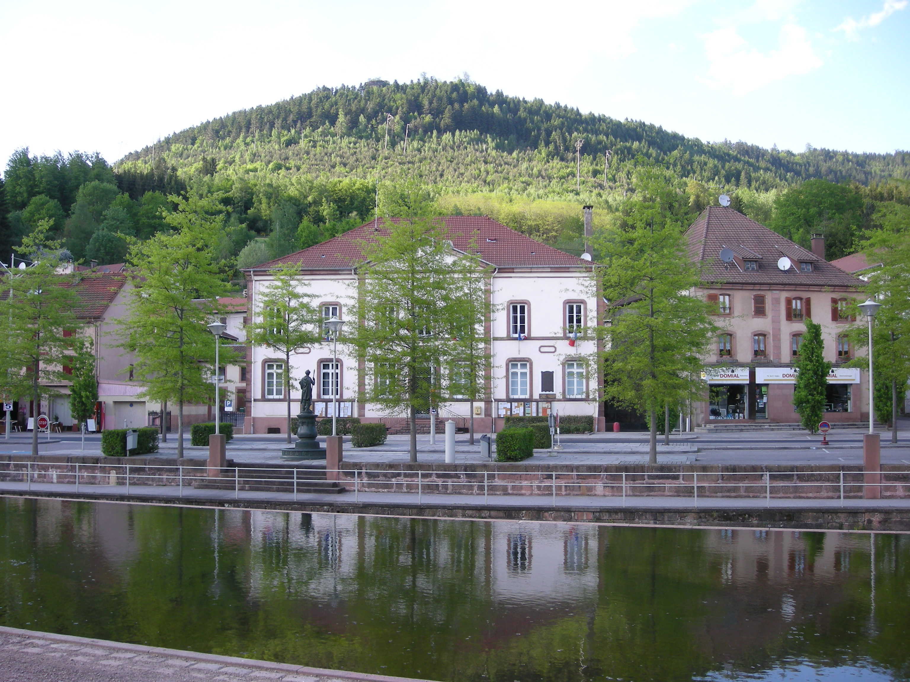 L'Hôtel de Ville de Moyenmoutier (Vosges), vu depuis les Jardins Dom Humbert Belhomme